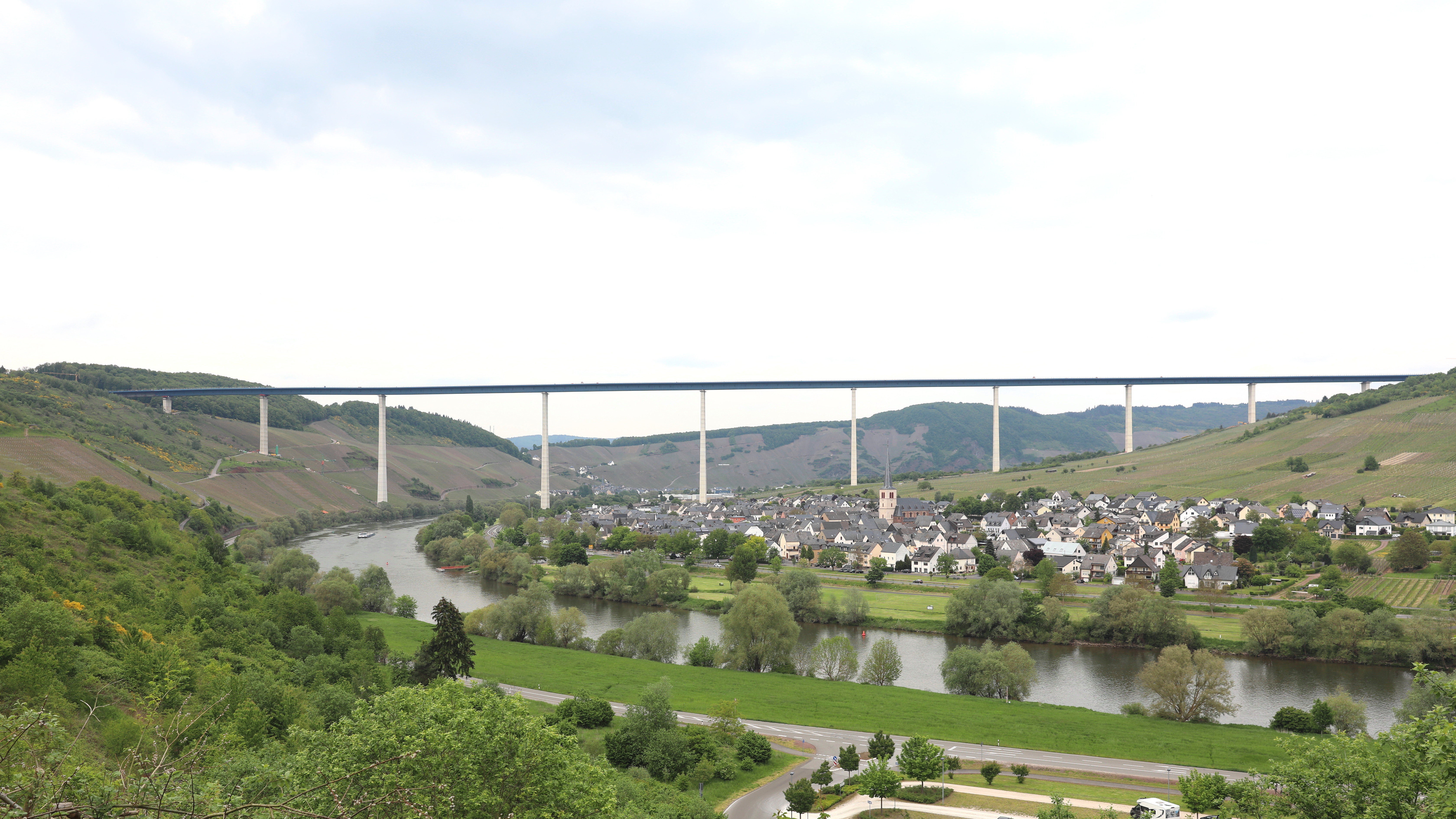 Hochmoselbrücke